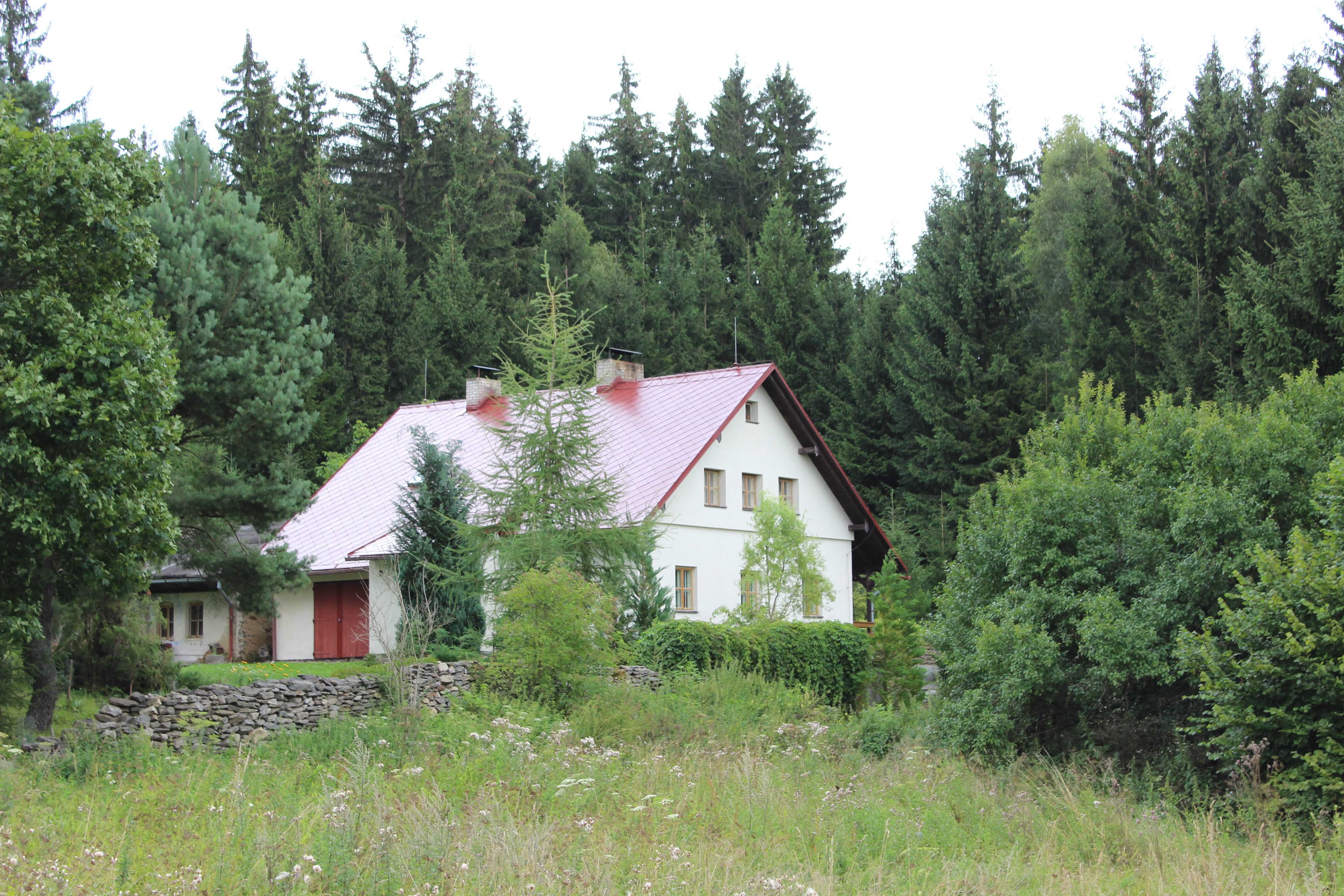 Dům číslo popisné 2 v Prostředním Krušci, části Hartmanic v klatovském okrese.